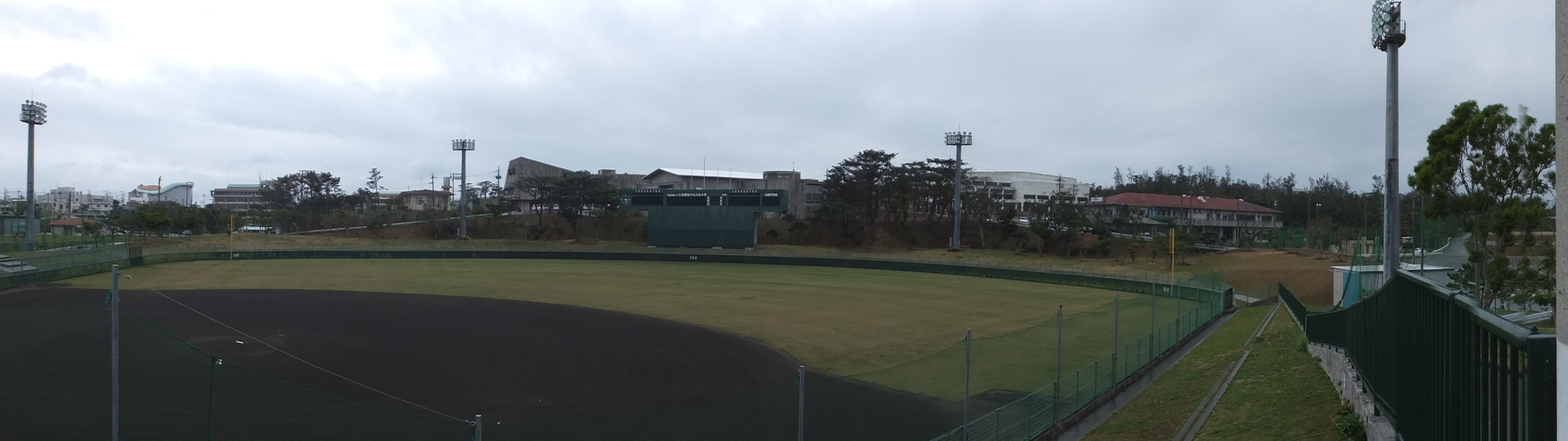 宜野座村営野球場のフィールド部分。